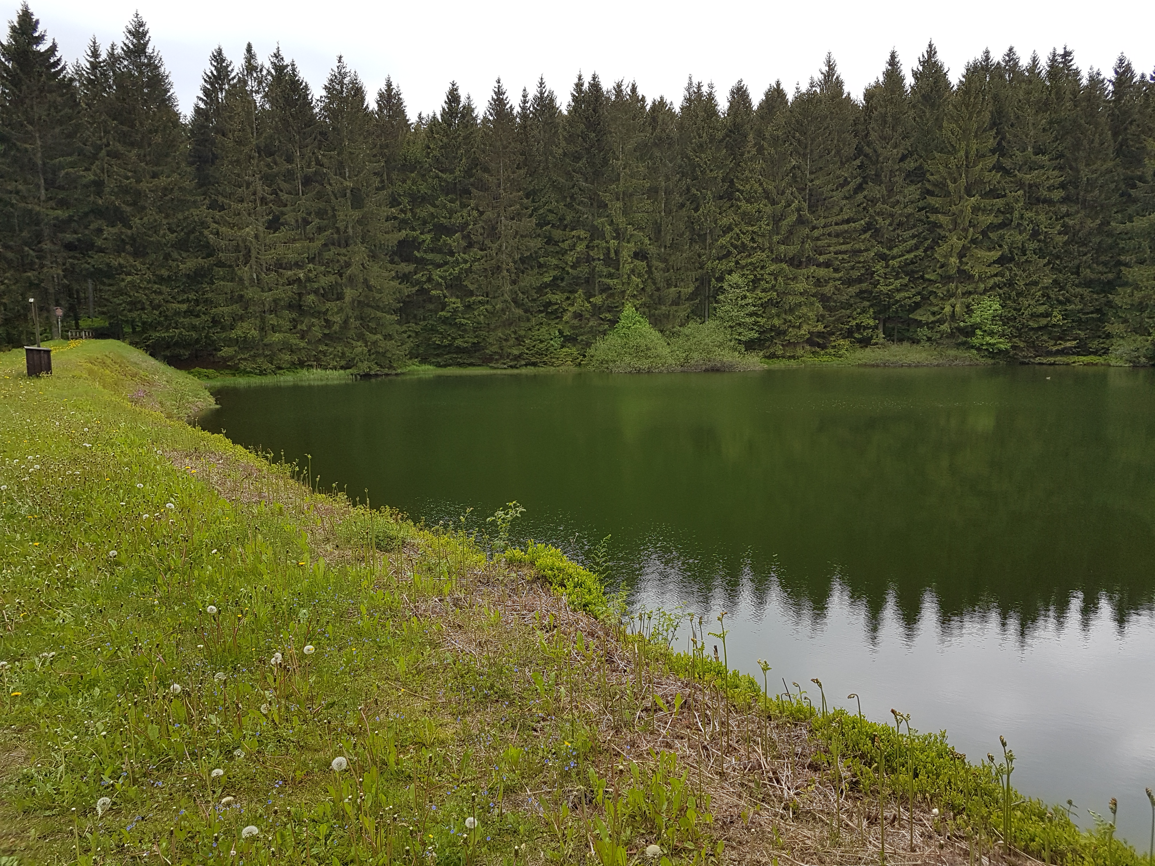 19.1-Mittlerer Einersberger Teich, 26-05-2019